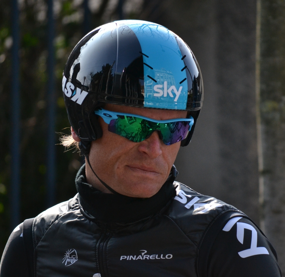 Vasil Kiryienka